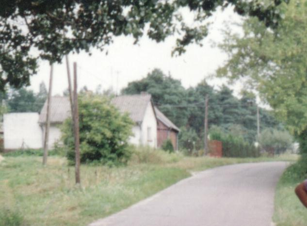 Zachodni fragment wsi Raducz